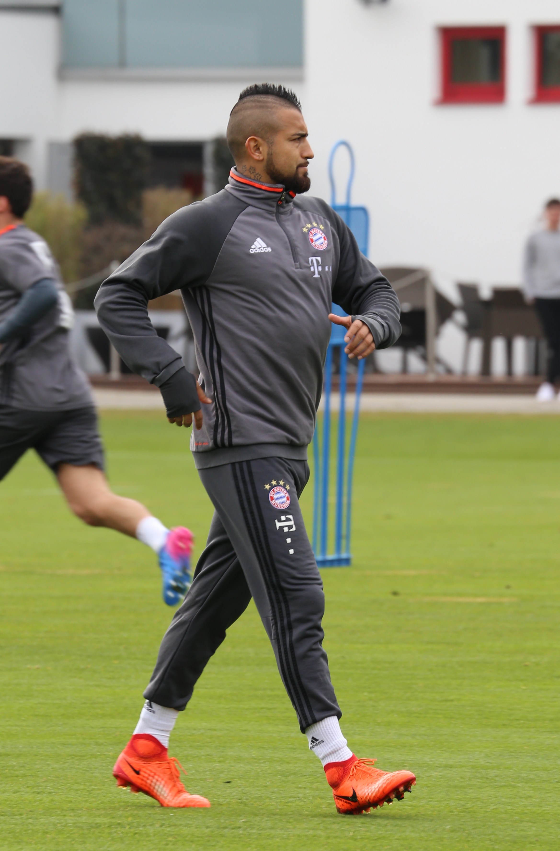 Arturo Vidal, am 14. März 2017 beim Training auf dem Gelände des FC Bayern München